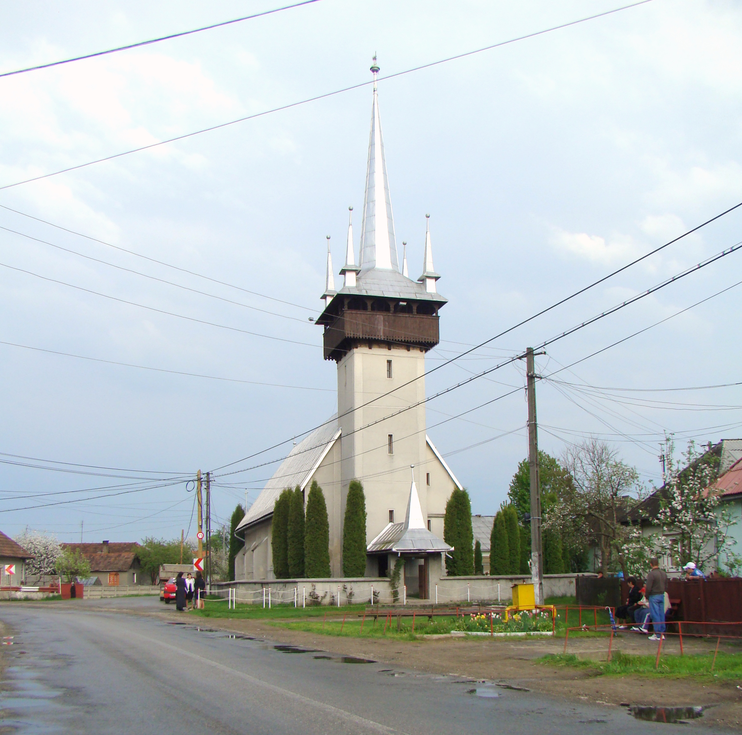 Biserica reformată din Dămăcușeni, județul Maramureș